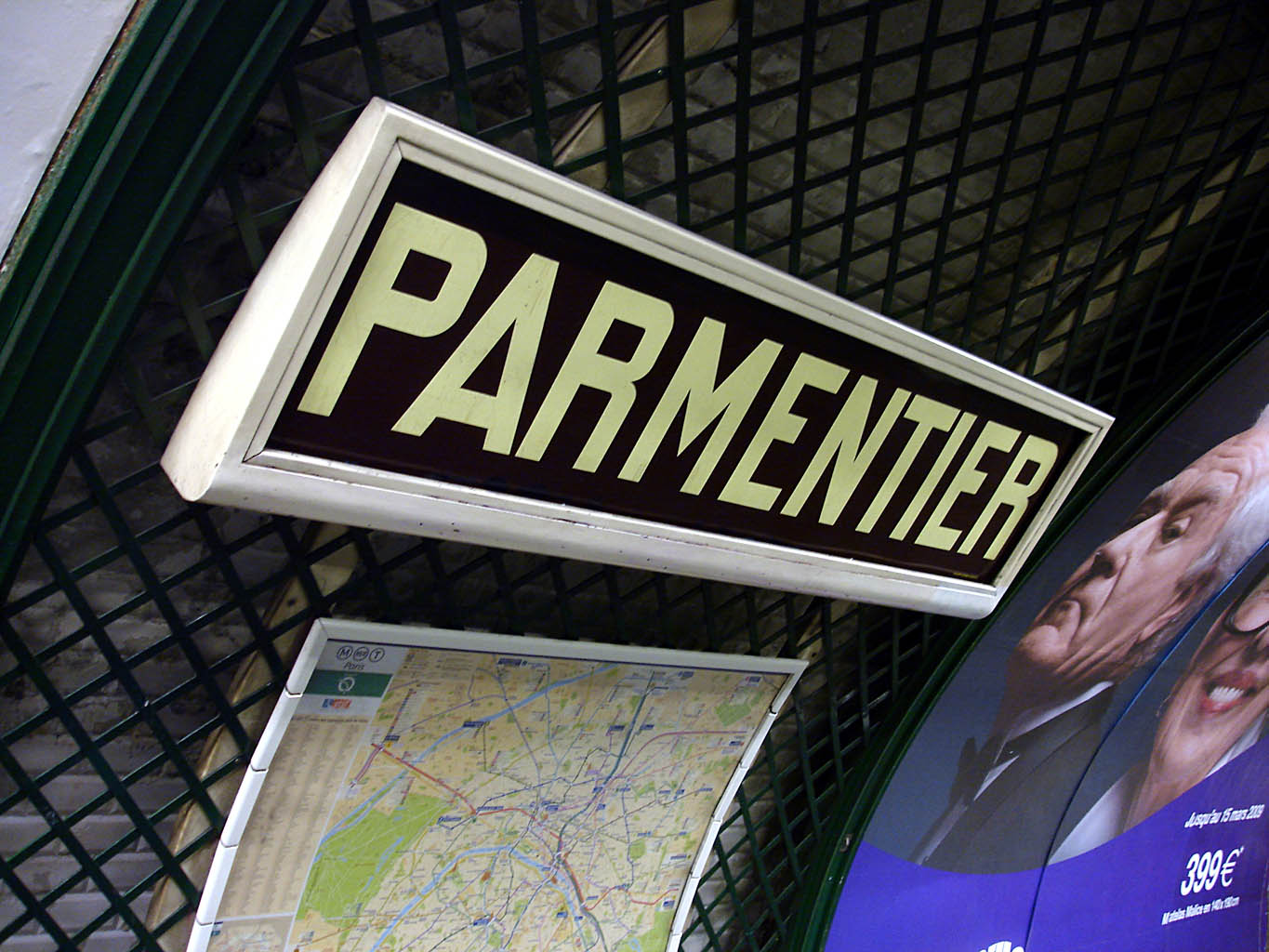 Station Parmentier de la ligne 3 du métro de Paris, France.